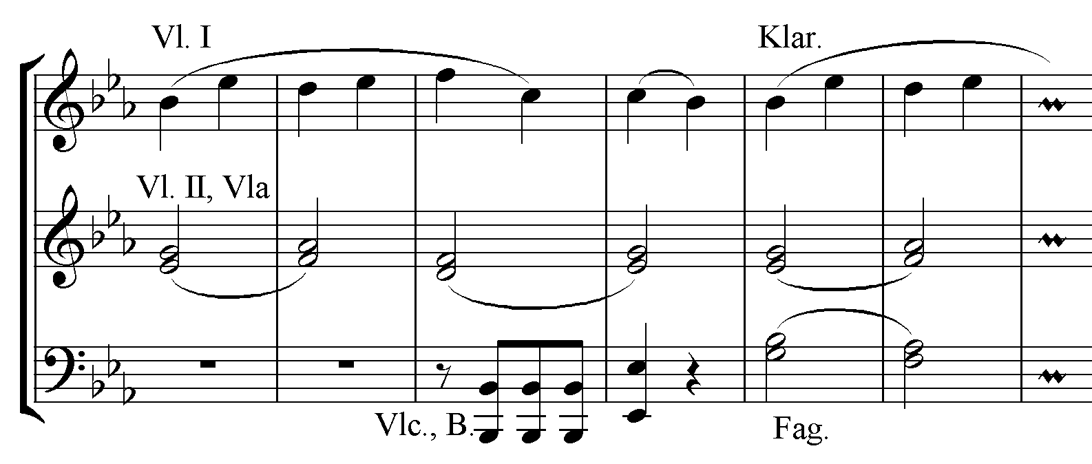 de es::de:Bild:Fuenfte-1-Seitenthema.png